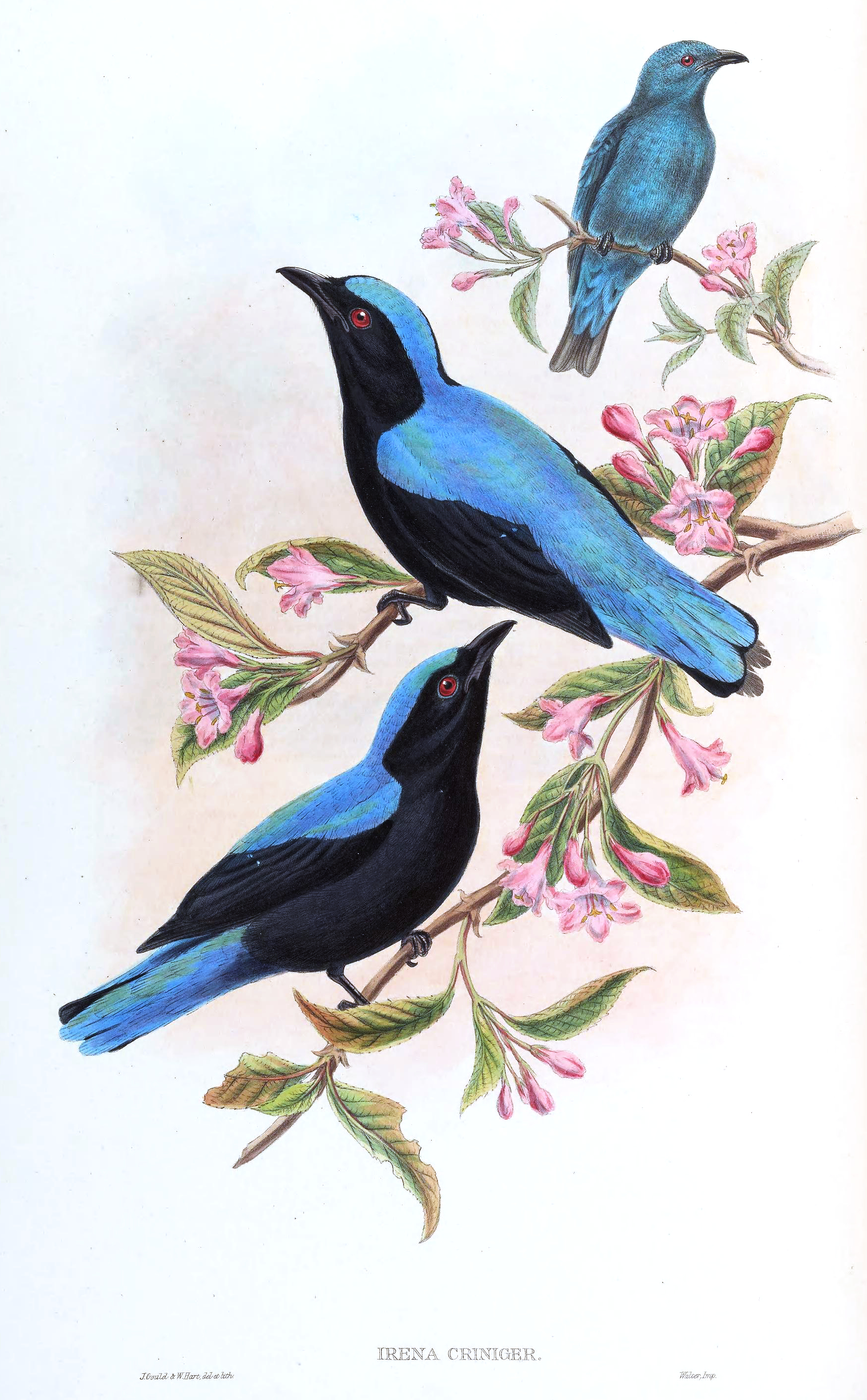 Irena criniger = Irena puella crinigera